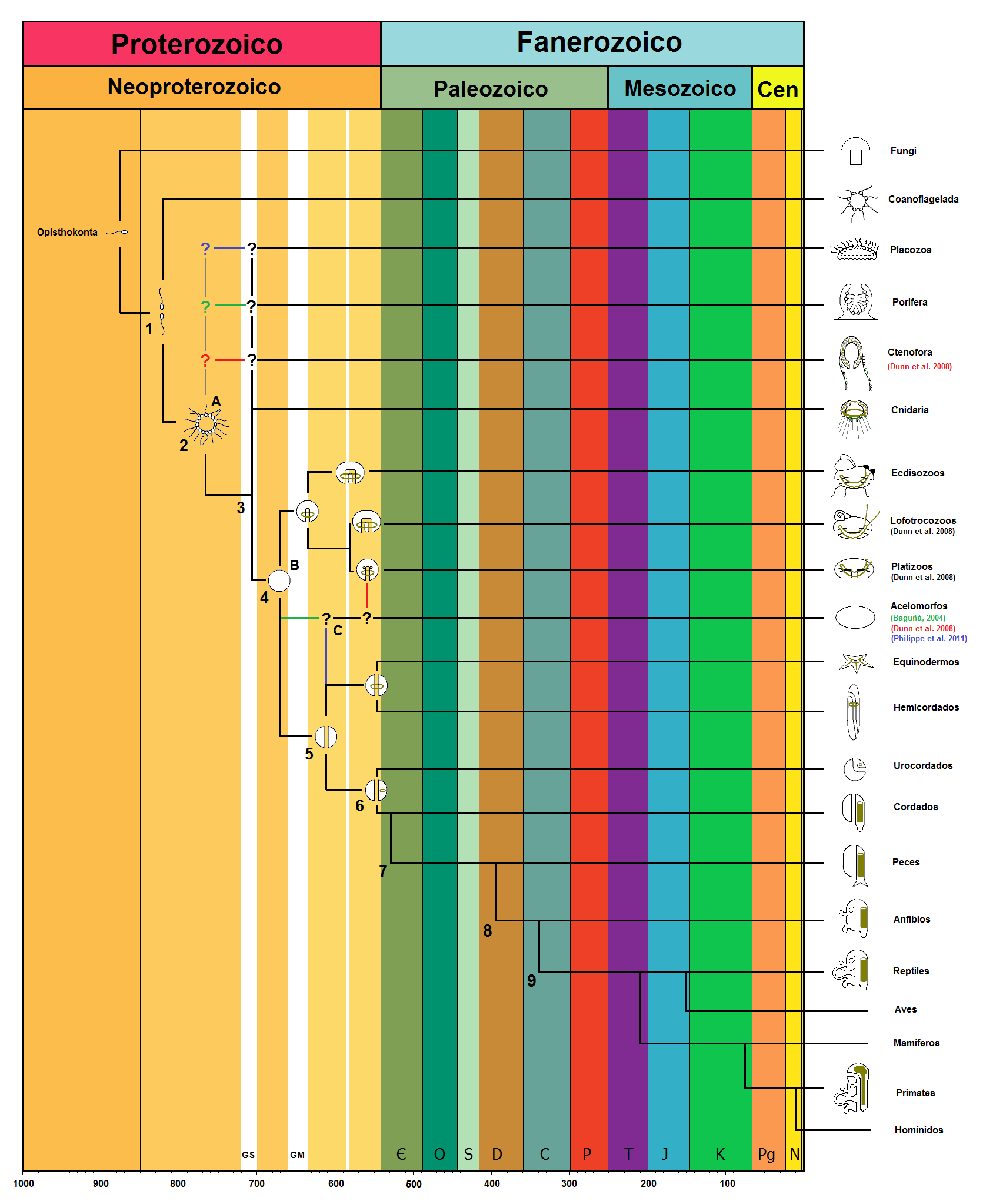 Cronología de aparición de opistoconta, metazoa (2), eumetazoa (3), bilateria (4), protostomia, deuterostomia (5) y cordados (6) basada en la media de los resultados de análisis molecular de Peterson K. J. et al. (2008). Se muestra entre interrogantes y letras algunos problemas de zoología actual como el problema de urmetazoa (A), urbilateria (B) y la asignación del filo de acoelomorpha (C) según Baguña (2004), Dunn et. al. (2008) y Philippe et. al (2011). Inclusión de los ctenoforos al problema de filos basales basado en el análisis molecular de Dunn et. al. (2008)). GS, Glaciación Sturtian y GM, Glaciación Marinoan. Vertebrata (7), tetrapoda (8) y amniota (9).